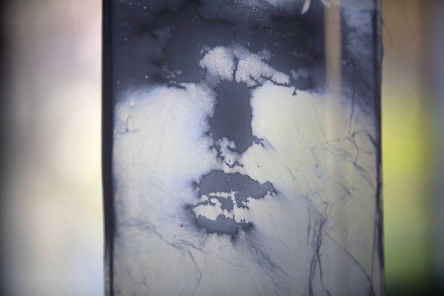 Irena Jůzová, Mamma mia, ten kluk je mi vším, vznik 2011